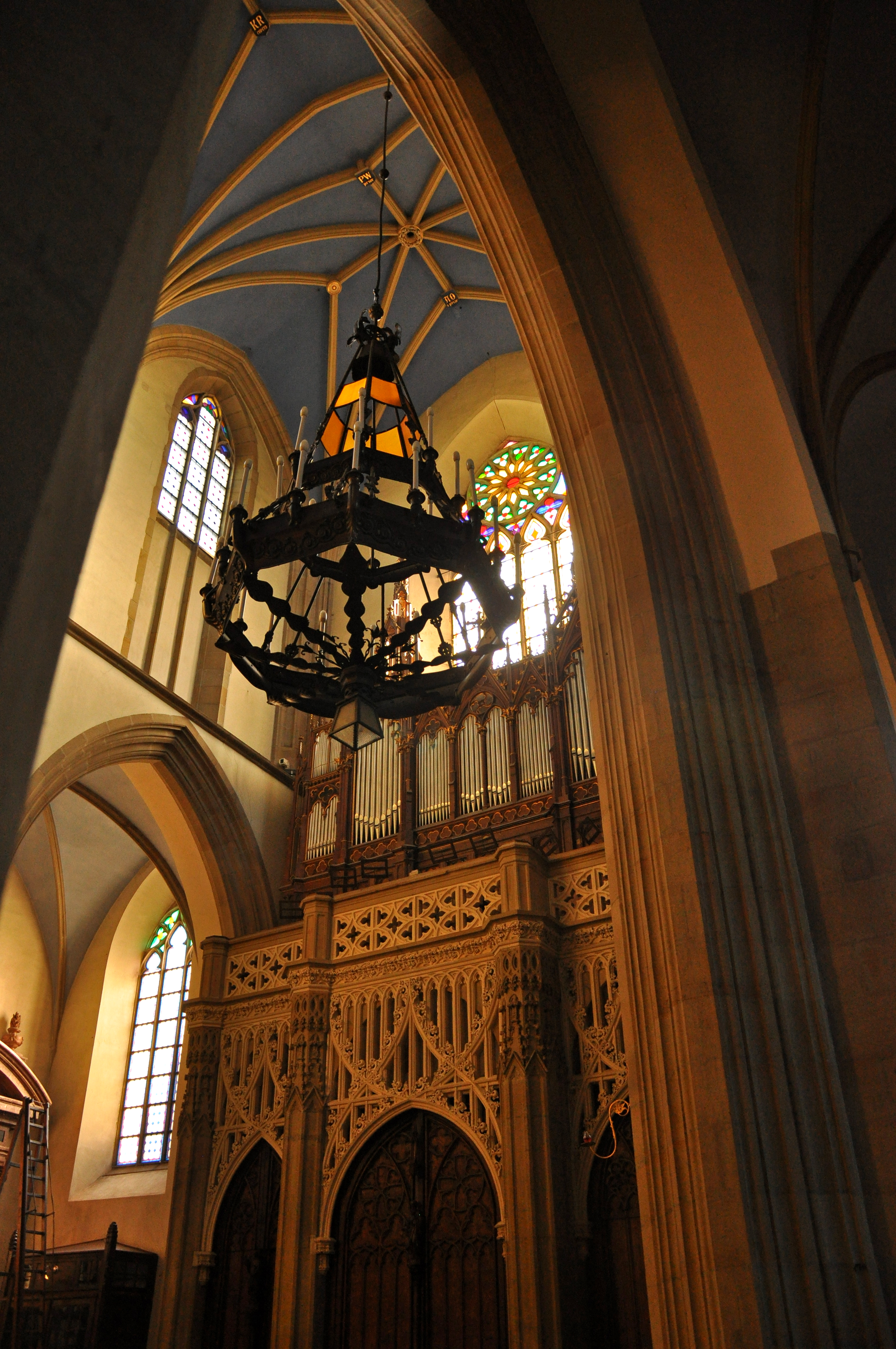 Bazylika Świętej Trójcy w Krakowie